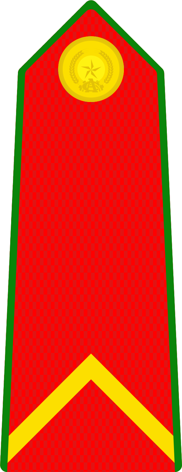 Cấp hiệu Chiến sĩ bậc 2 Công an